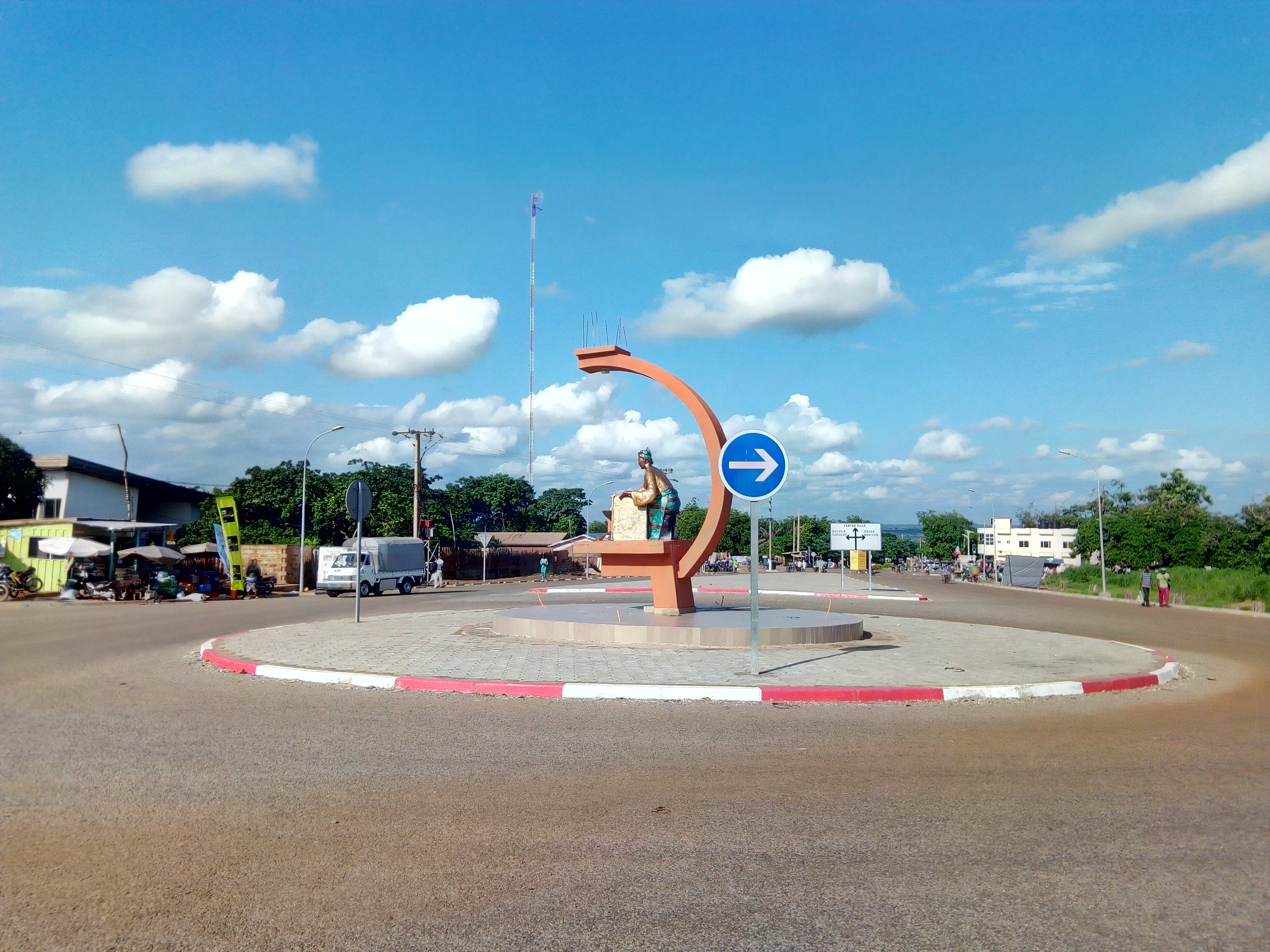 Palais royal de Savalou Wikidata has entry Q66436547 with data related to this item.